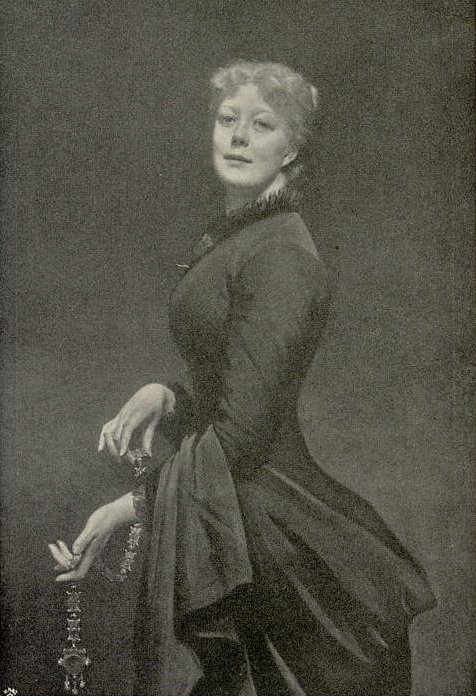 Max Koner: Frau Sophie Koner,_1884